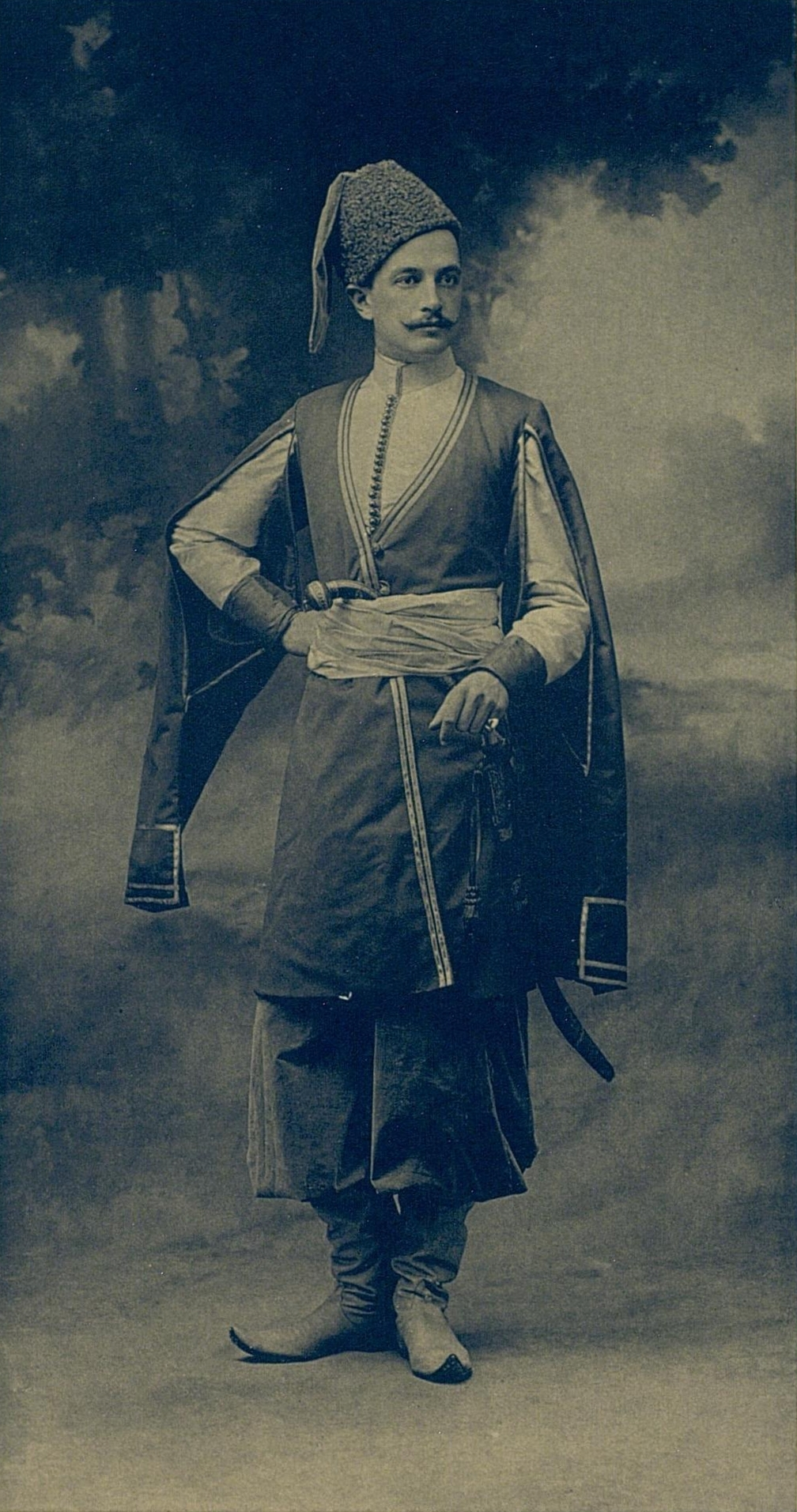 Штабс-ротмистр Лейб-гвардии Конно-гренадерского полка Владимир Николаевич Николаев, в костюме есаула Сумского слободского казачьего полка 1651 года.